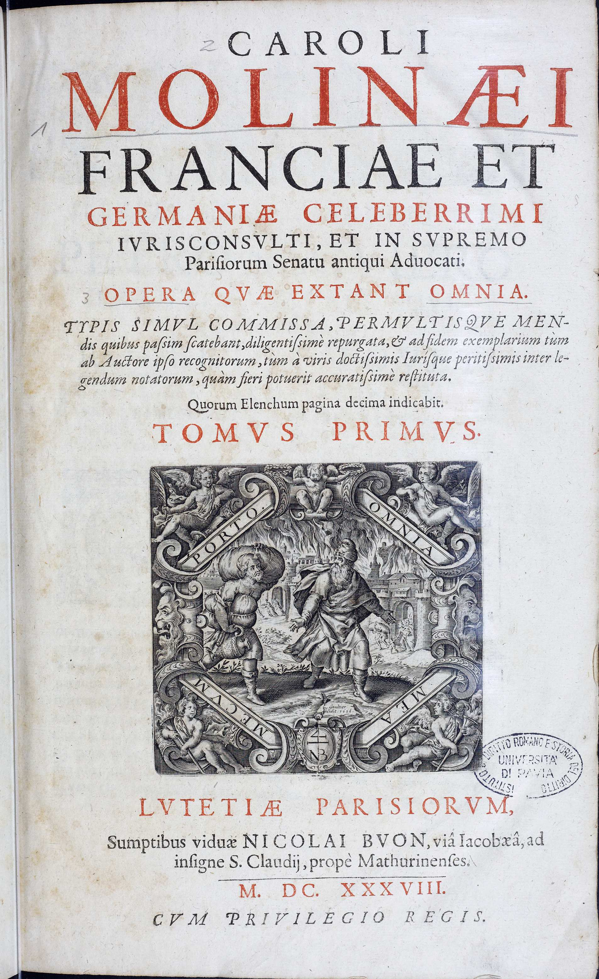 Frontespizio